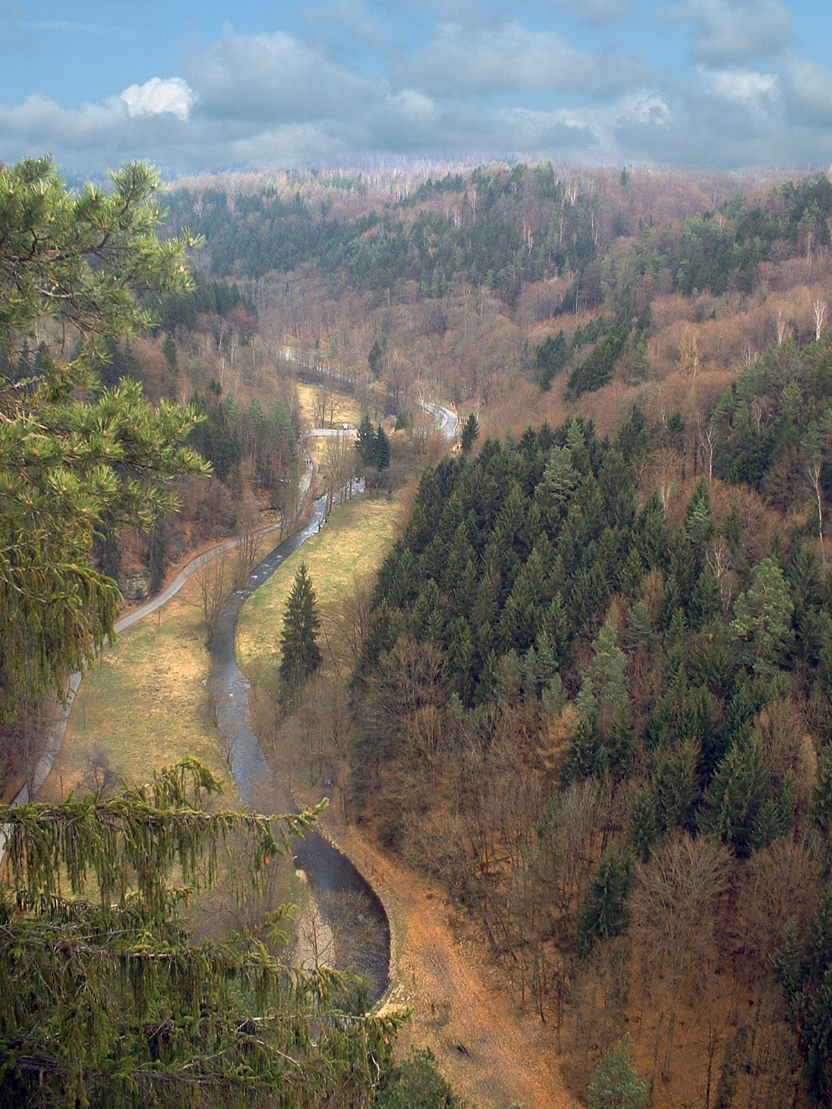 Das Polenztal nahe Hohnstein in der Sächsischen Schweiz Deutschland.